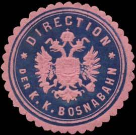 Sealing stamp Title: Direction der K.K. Bosnabahn Description: Eisenbahn, orange, dunkelblau, geprägt Place: Sarajevo size: 4 cm